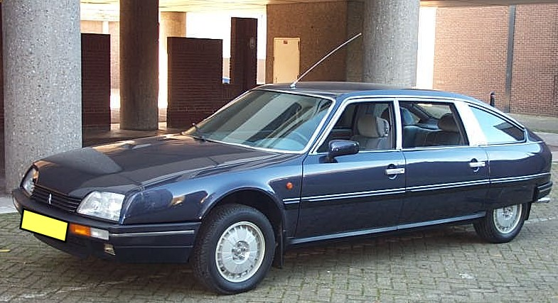 Citroen CX 2500 Prestige (lwb) 1988